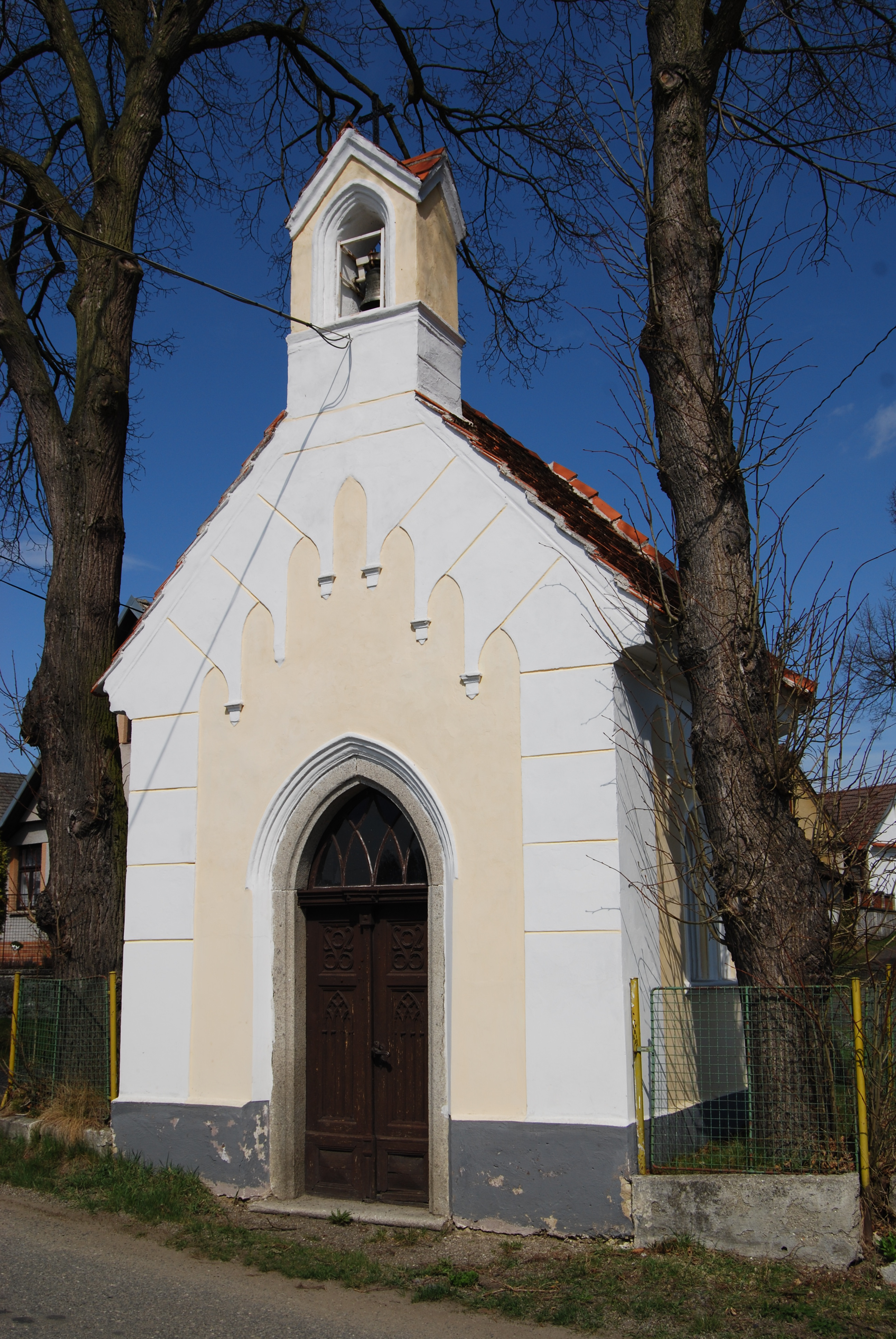 Návesní kaple Panny Marie z 20.stol. Přílepov je místní část obce Kostelec nad Vltavou..Okres Písek. Česká republika.